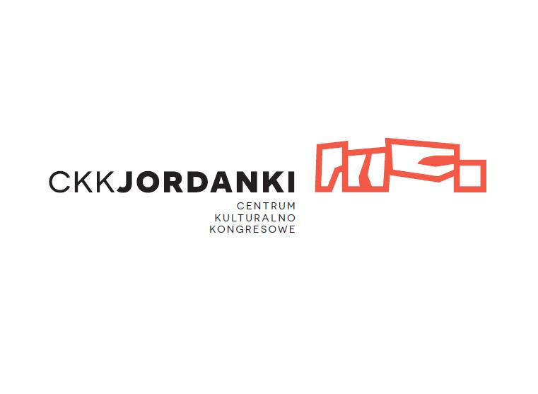 Logo Centrum Kulturalno-Kongresowego Jordanki